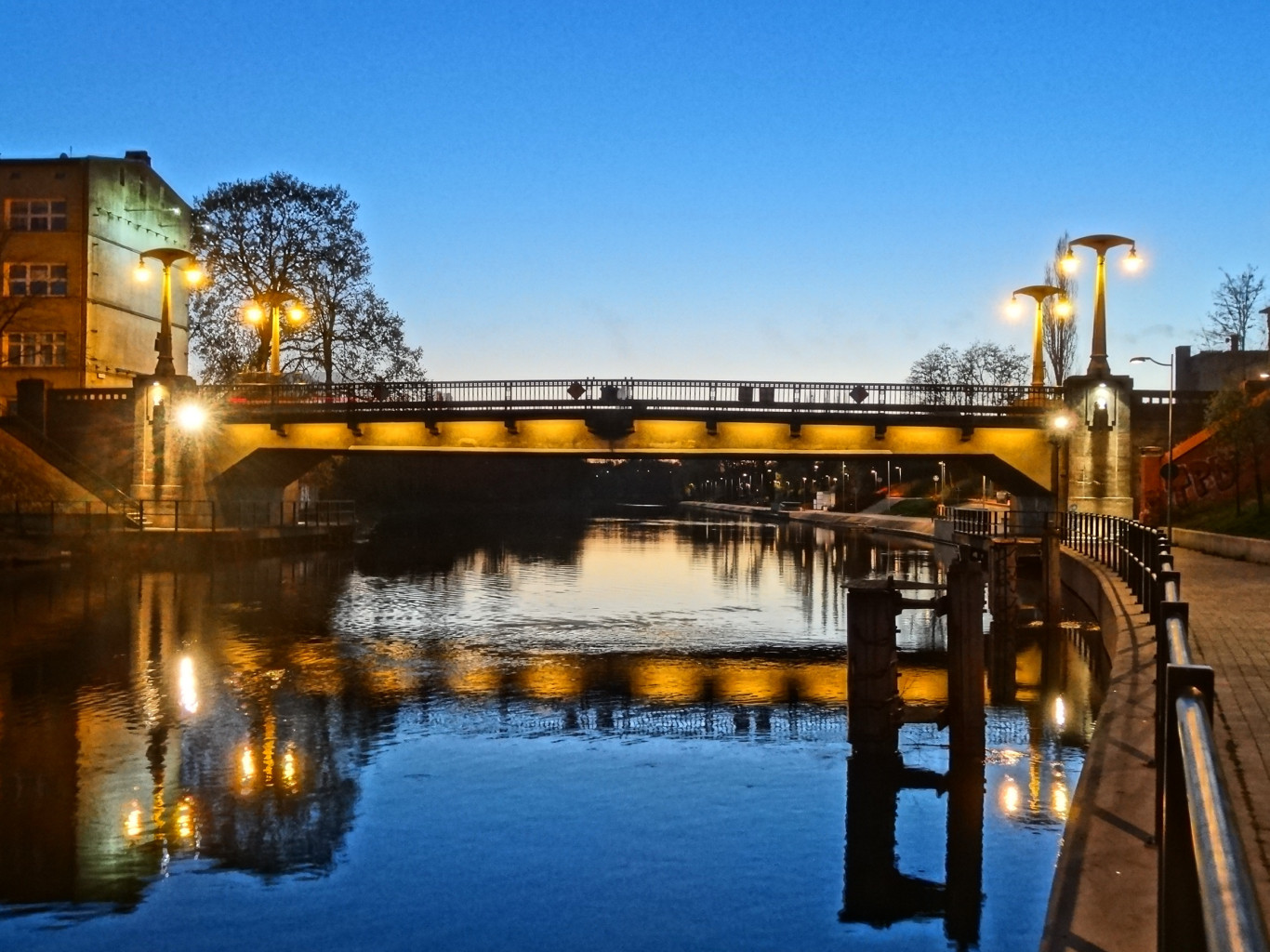 Most im. Królowej Jadwigi nad Brdą w Bydgoszczy